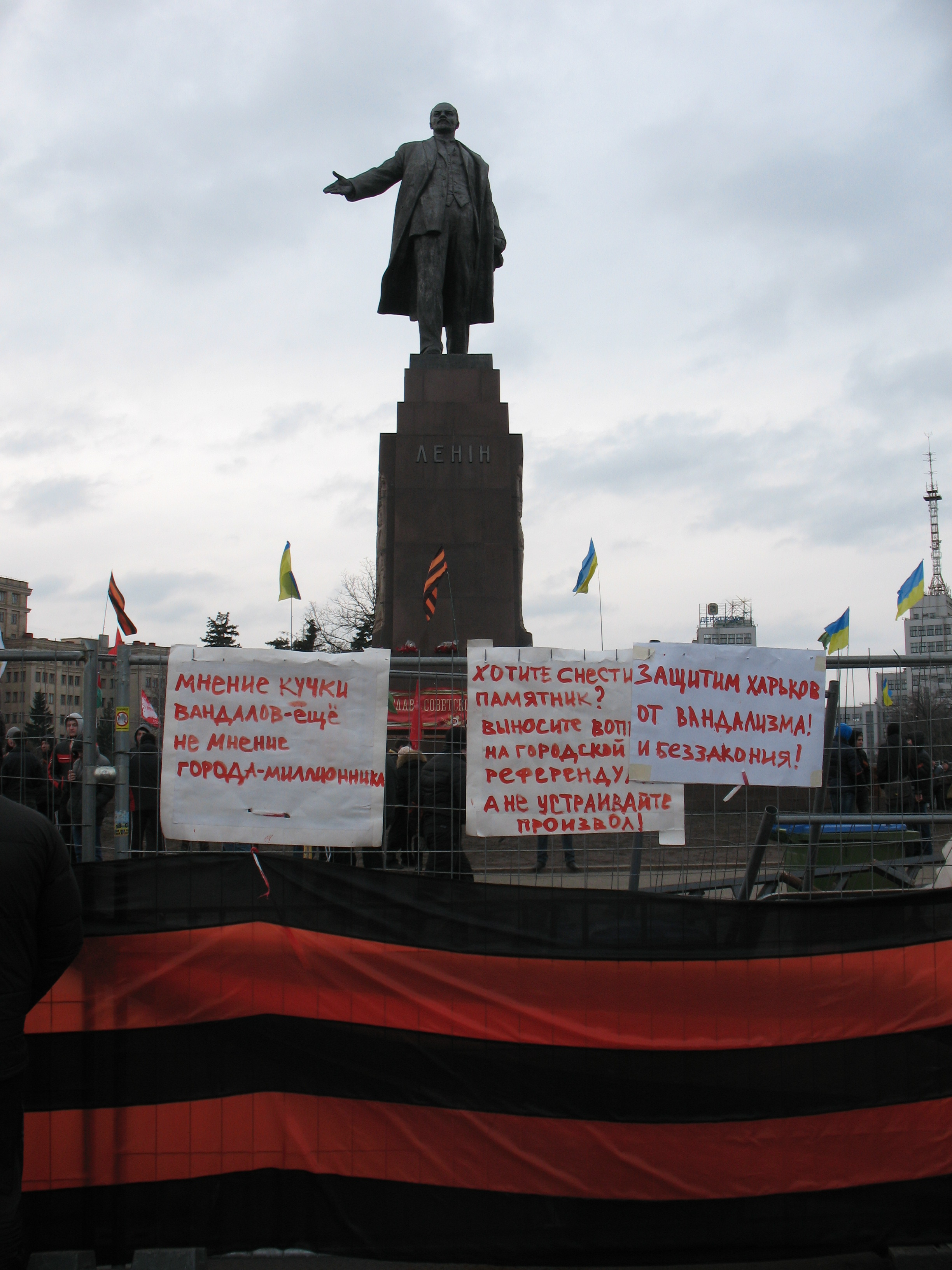 Харьков, 23 февраля. Защита памятника Ленину горожанами от приехавших в город 22 февраля боевиков "Правого сектора", которые пытаются его снести. "Мнение кучки вандалов - ещё не мнение города-миллионника!" "Защитим Харьков от вандализма и беззакония!"